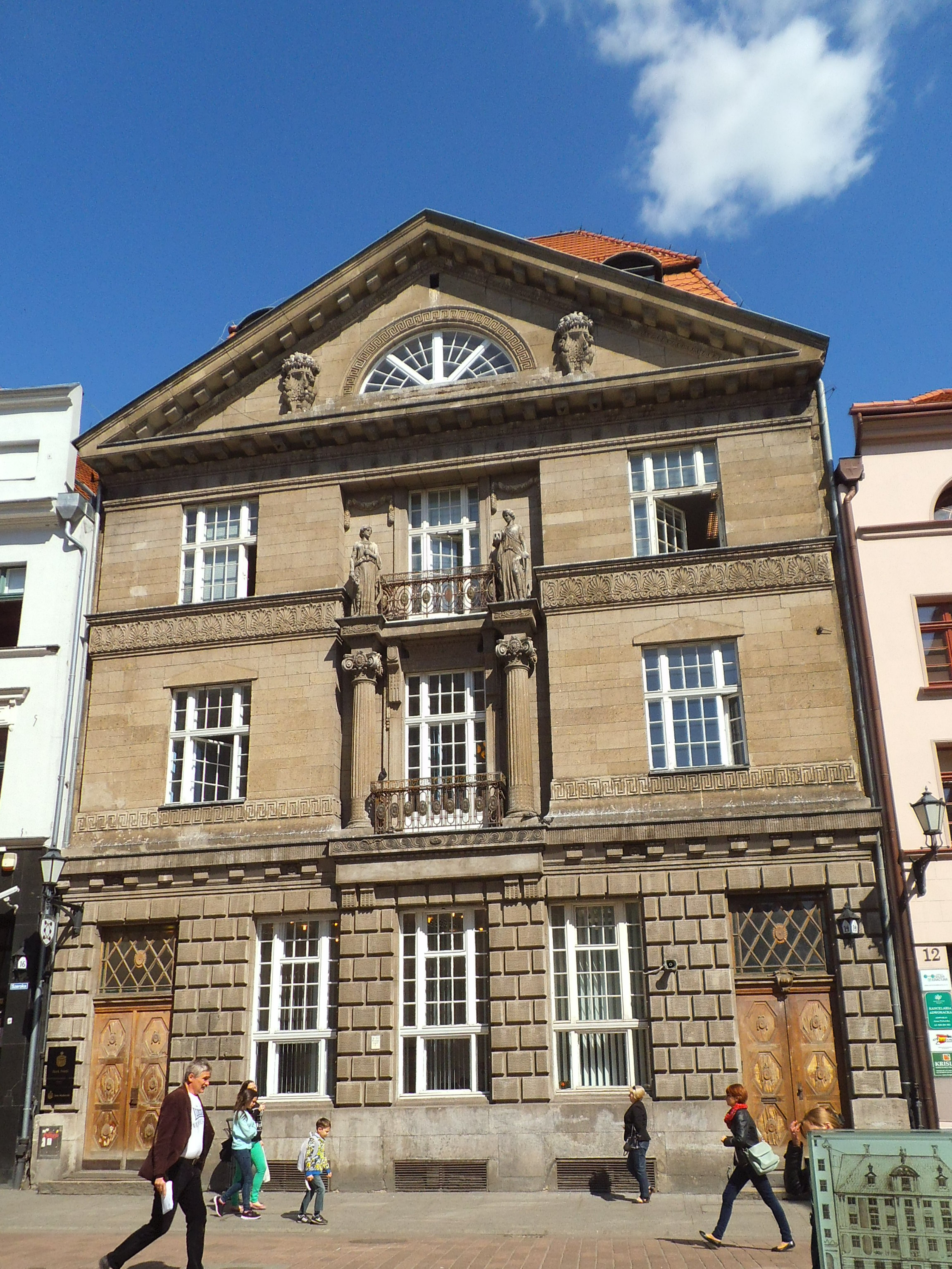 PKO Bank Polski w Toruniu